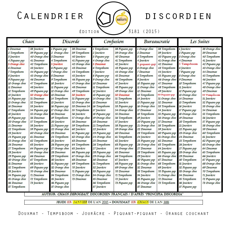 calendrier Discordiens français, d'après le principia discordia